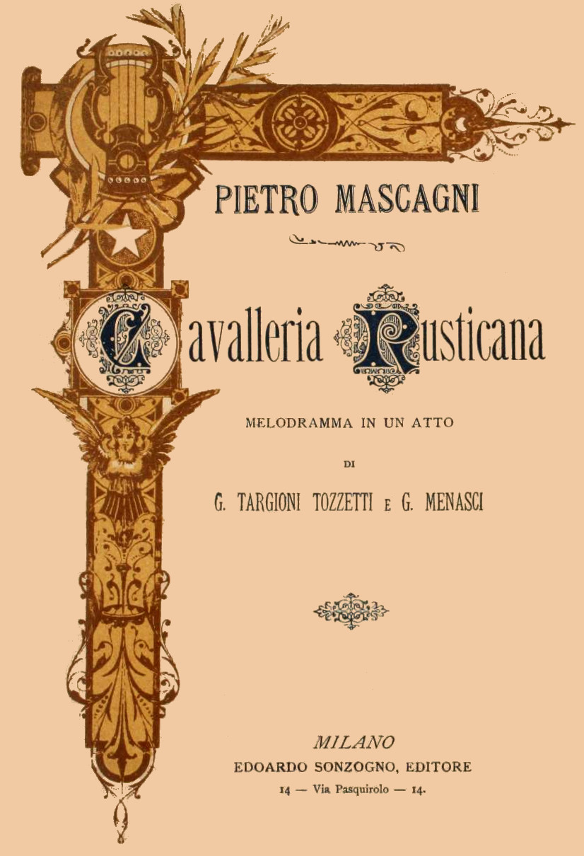 Pietro Mascagni's "Cavalleria Rusticana" libretto cover from 1901/1906